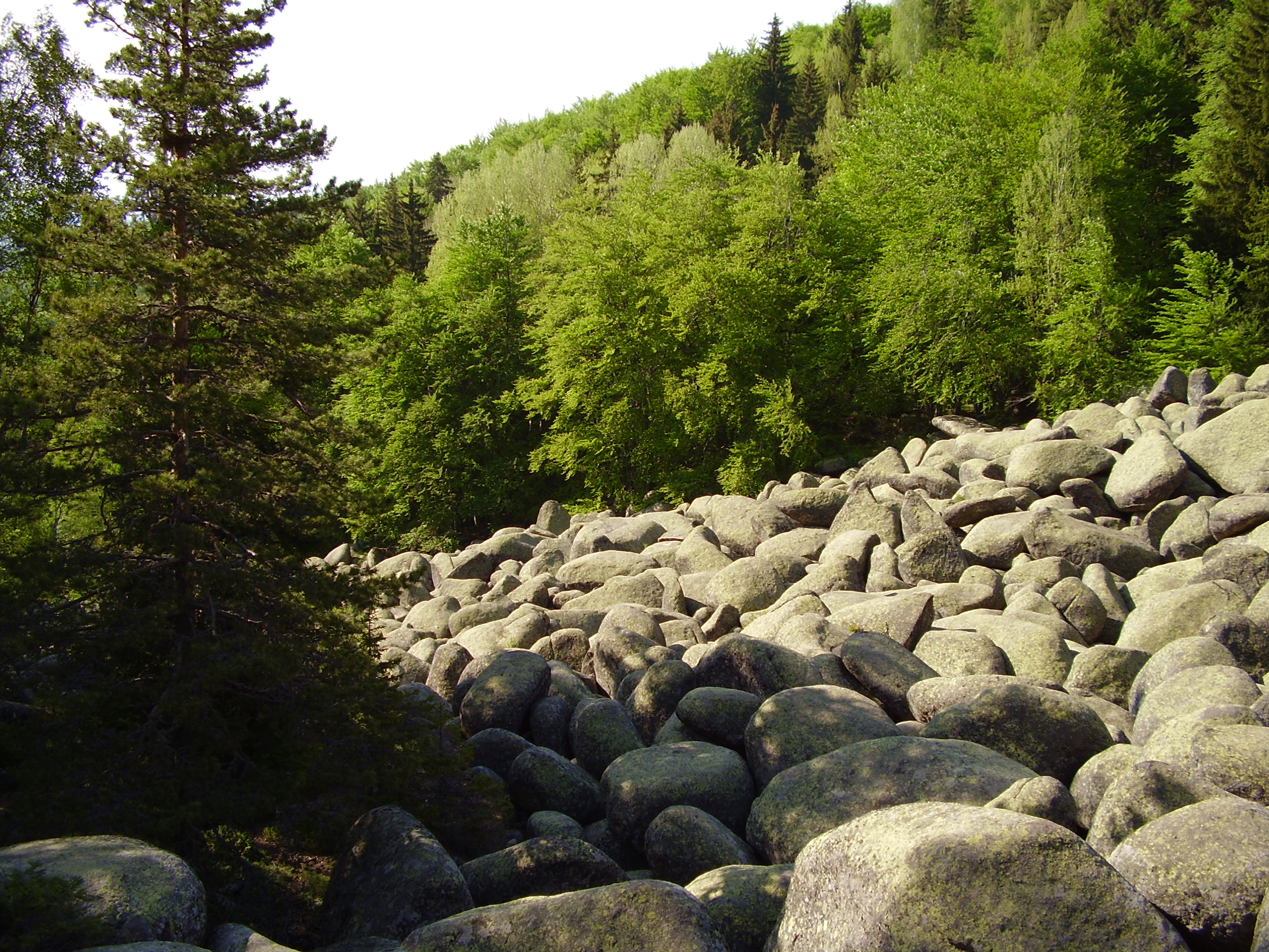 Местността „Златните мостове”, природен парк „Витоша”